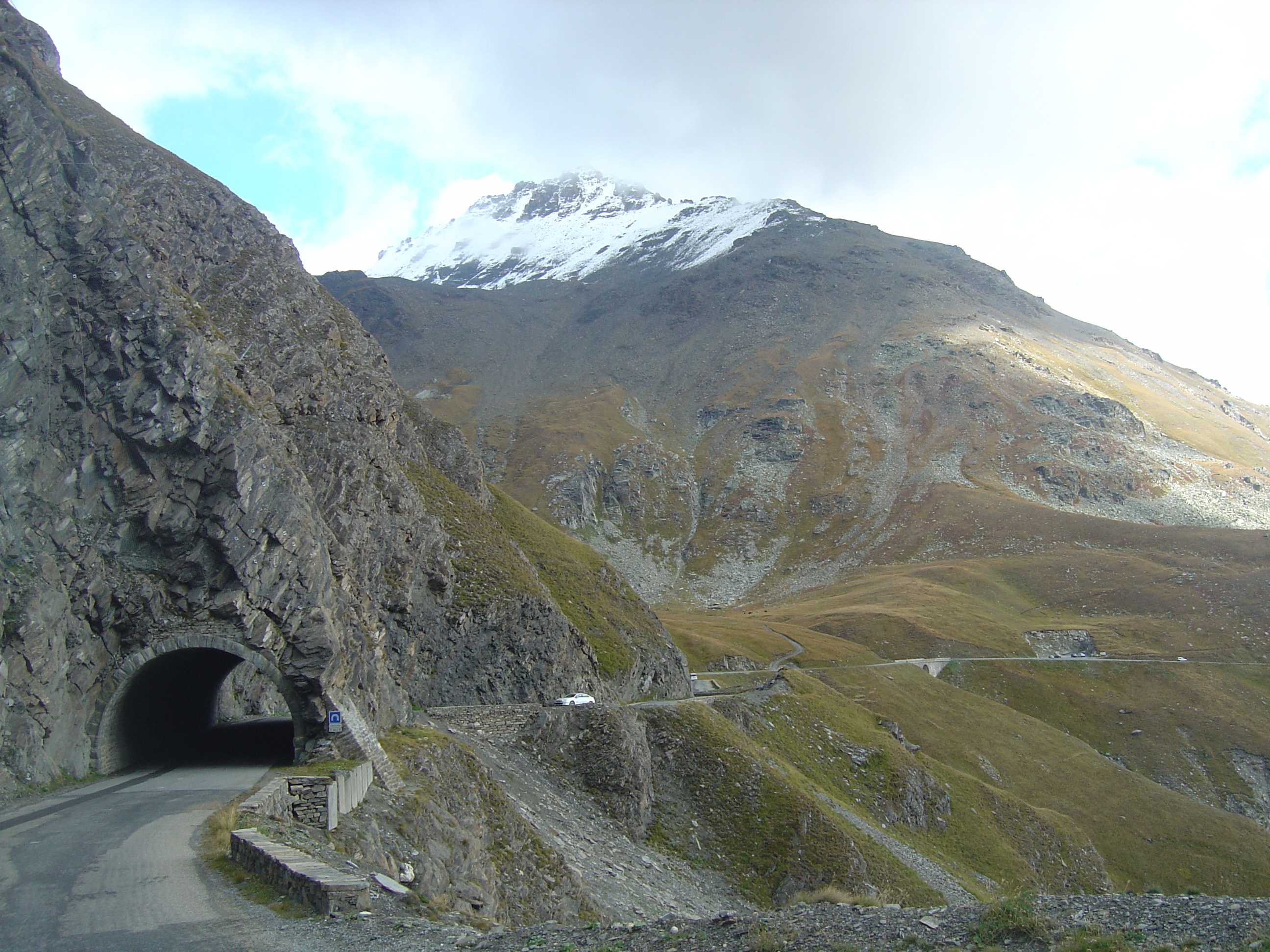 Route du versant Sud du col de l'Iseran. Photo dans le sens de la descente. Plus bas un tunnel puis le pont de l'Oulietta. La pente est plus douce ici.